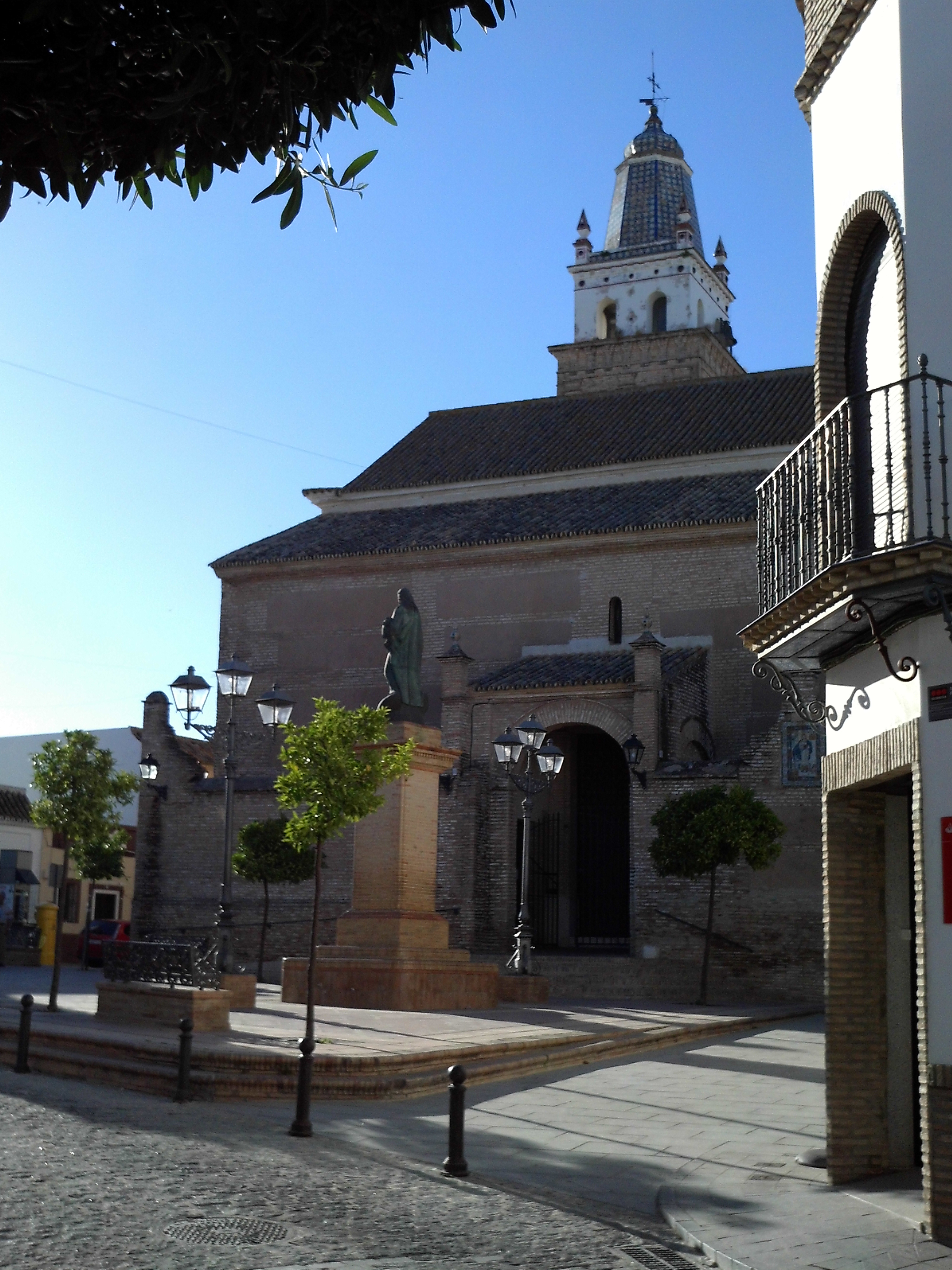 Vista de la plaza de España de Salteras, con la iglesia parroquial de N. Sra. de la Oliva y el monumento al Sagrado Corazón